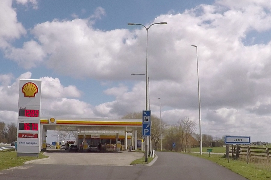 Verzorgingsplaats Laerd aan de A7 in Nederland.